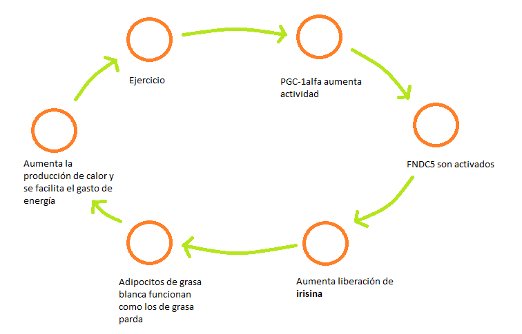 Relación entre ejercicio e irisina.